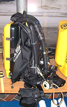 Un reciclador de circuit electrònic totalment tancada (pressió ambiental busseig Inspiració) Acrònim CCUBA (aparell de respiració sota l'aigua en circuit tancat); CCR (reciclador de circuit tancat), SCR (rebreather semi-tancat) usos conjunt per respirar articles relacionats aparells Davis